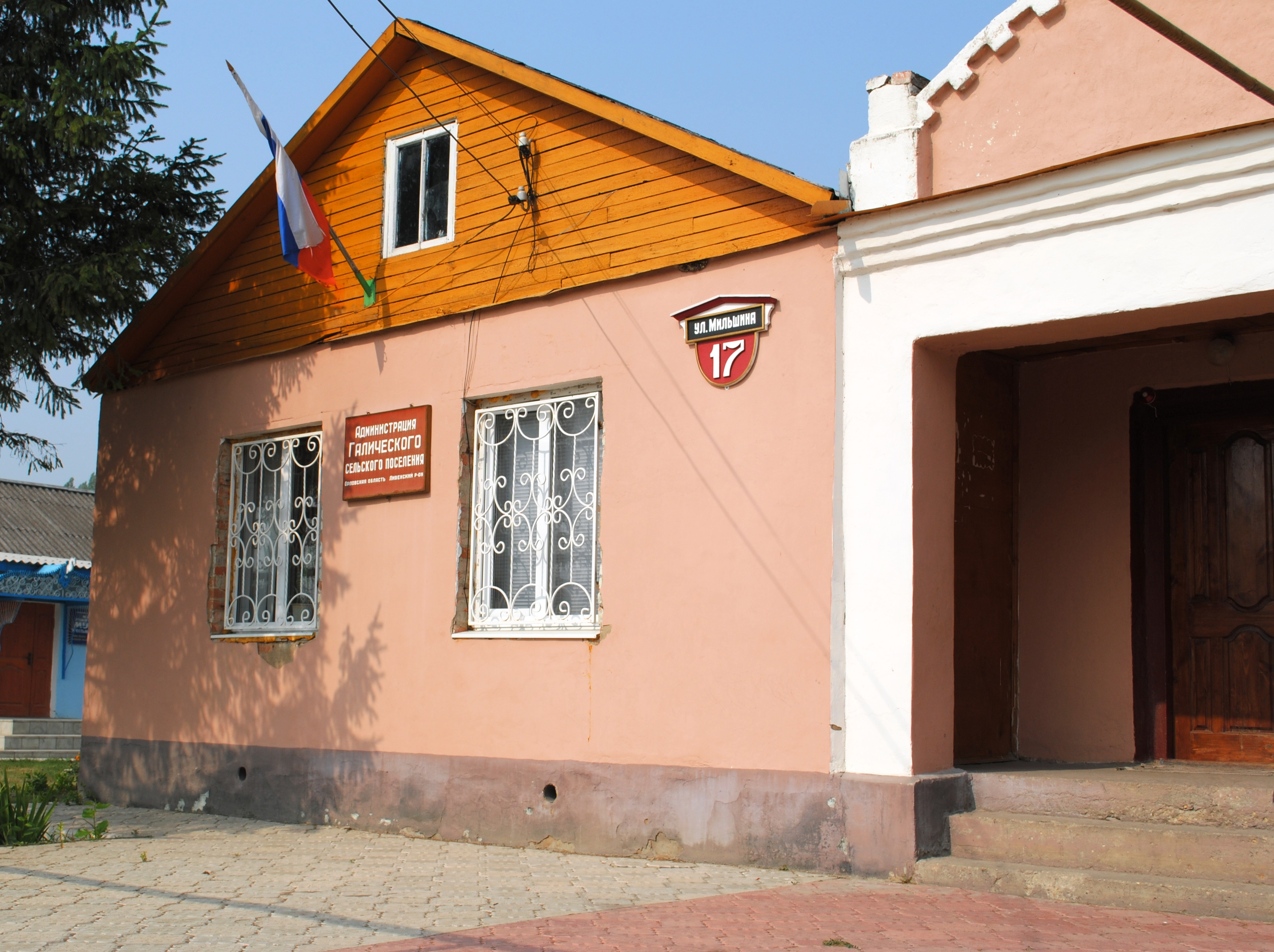 Галический Сельсовет